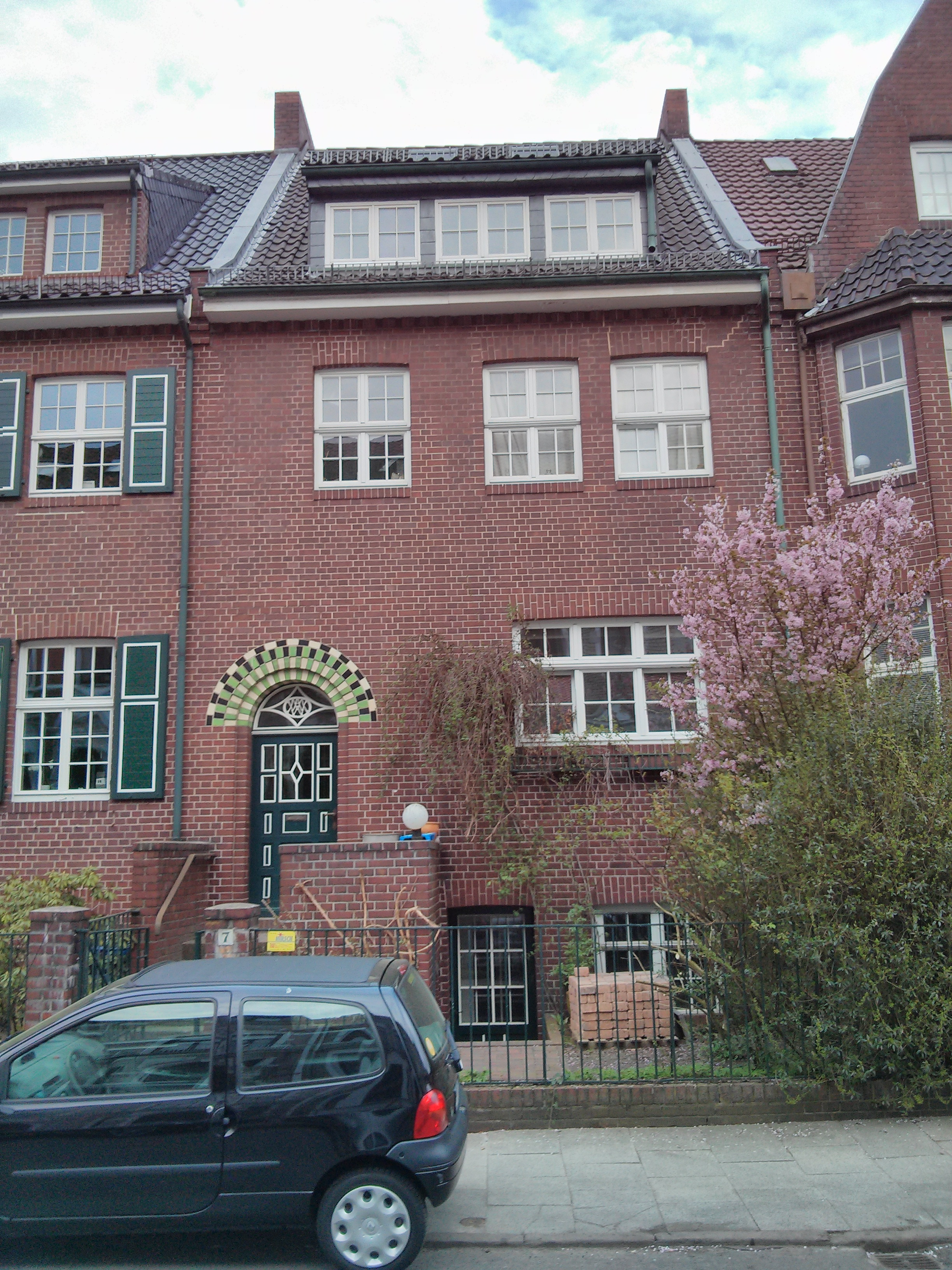 Haus Magnussen in Bremen, Hagenauer Straße 7 Das abgebildete Objekt ist ein geschütztes Kulturdenkmal in der Freien Hansestadt Bremen, mit der Nr. 0465 beim Landesamt für Denkmalpflege registriert.